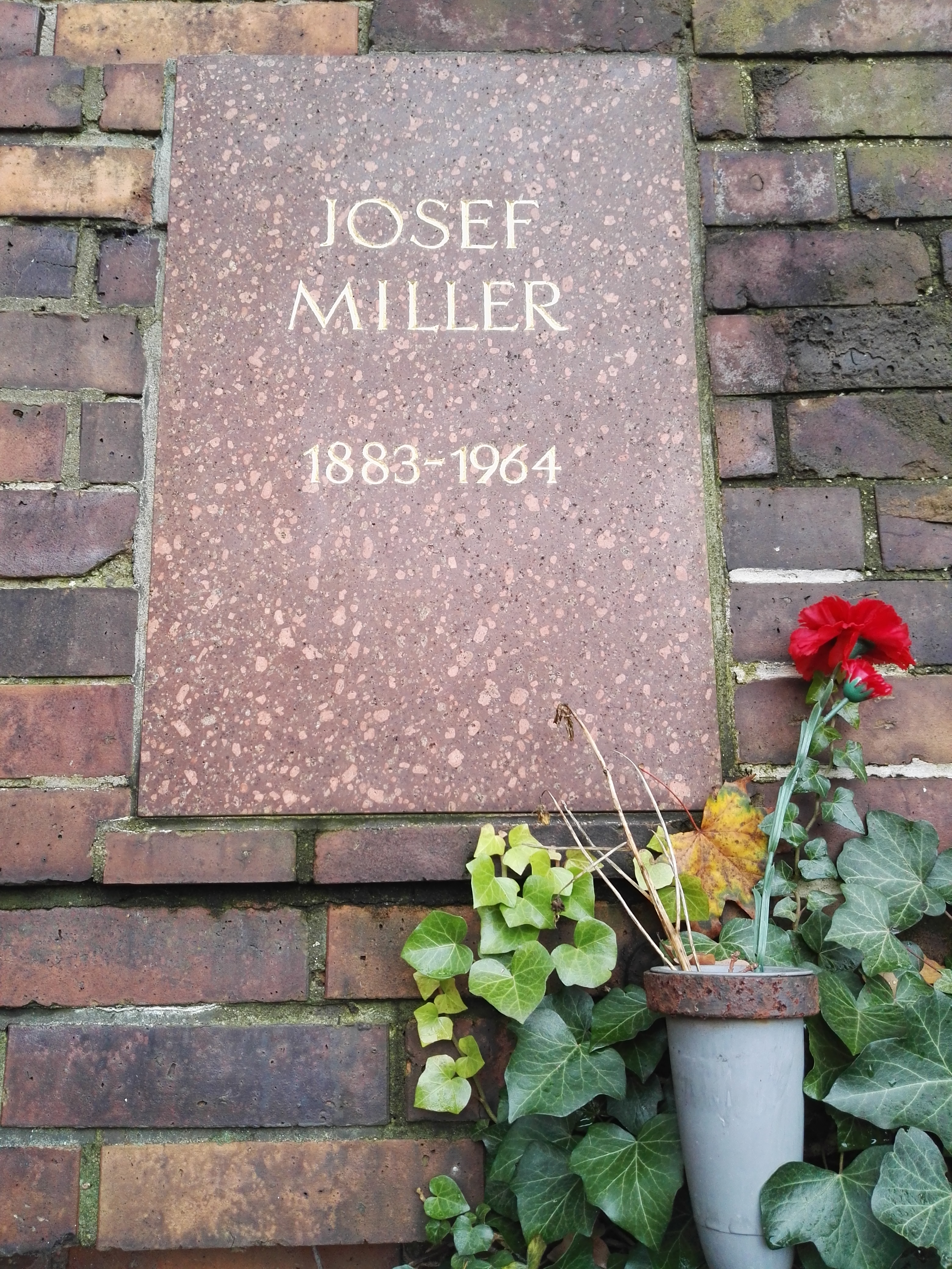 Grab von Josef Miller in der Gedenkstätte der Sozialisten auf dem Zentralfriedhof Friedrichsfelde in Berlin-Lichtenberg